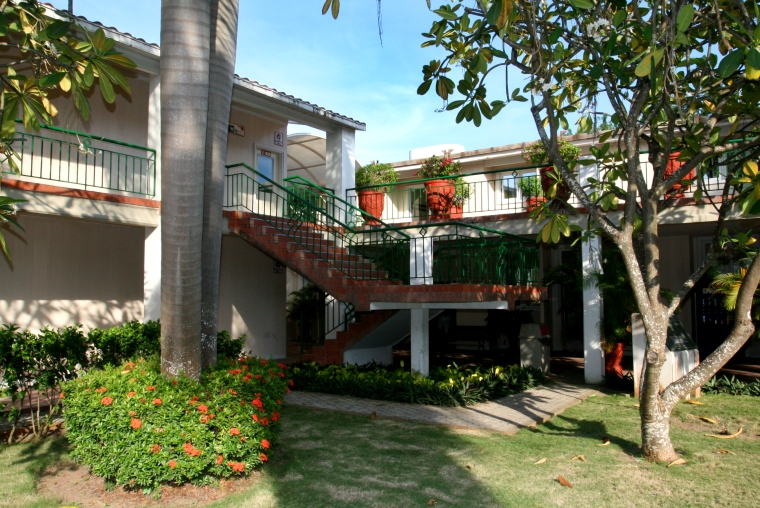 Plano abierto del bloque de idiomas ubicado en las instalaciones de la Universidad del Norte en Barranquilla Colombia